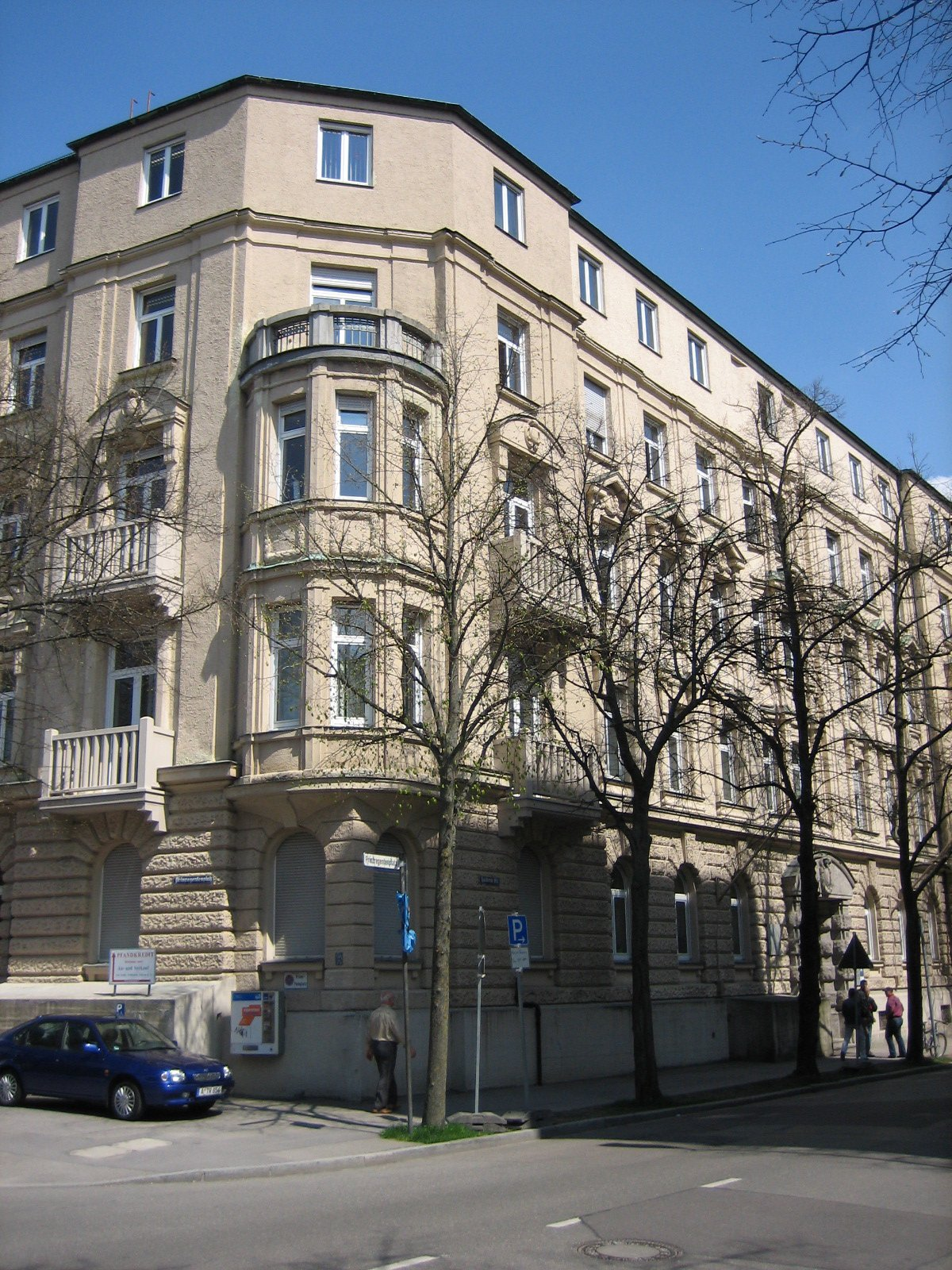 Augsburg, Gebäude, in dem das Sozialgericht Augsburg tätig ist, Blick vom Prinzregentenplatz